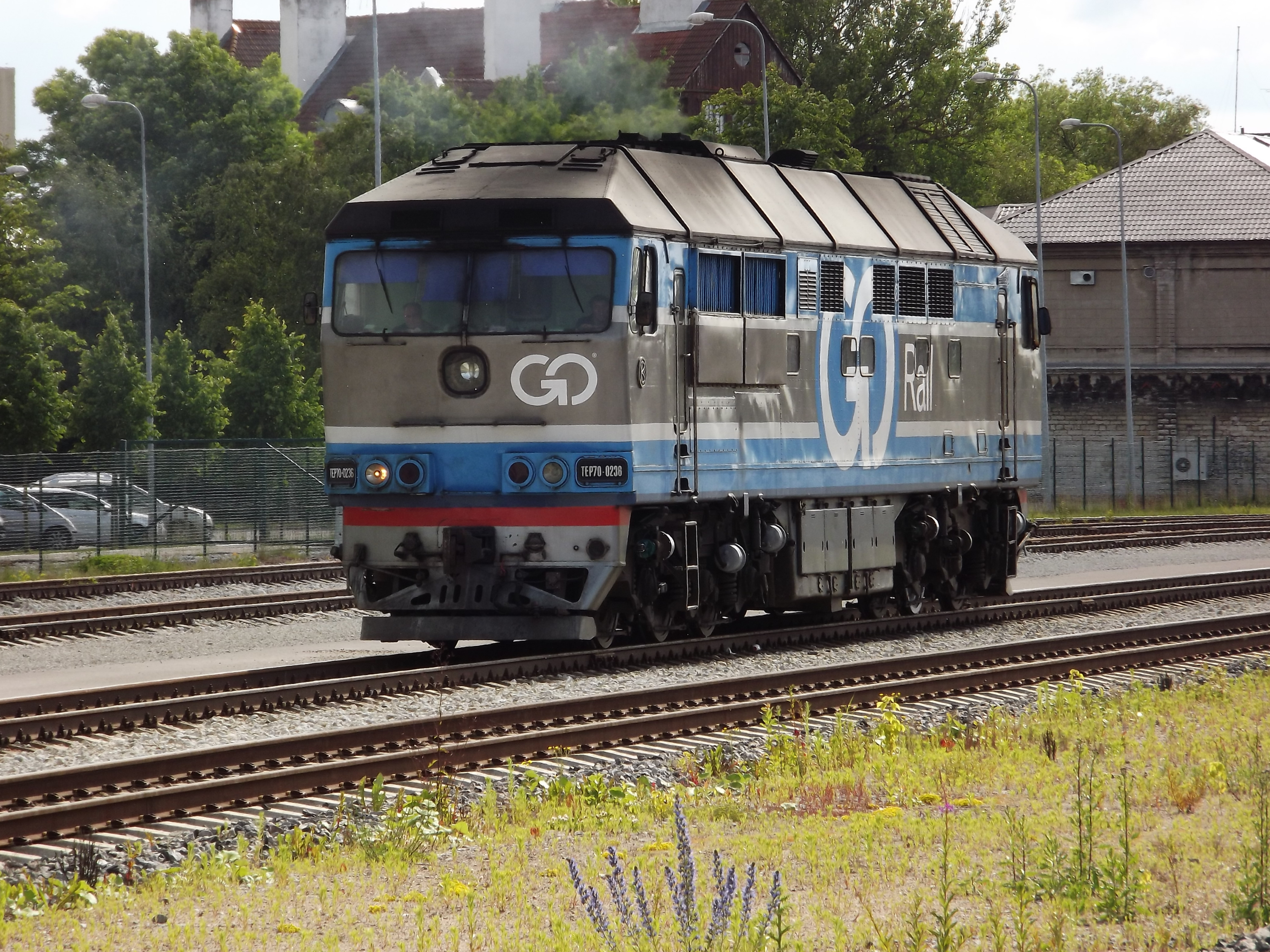 GoRaili TEP70-0236 Balti jaamas